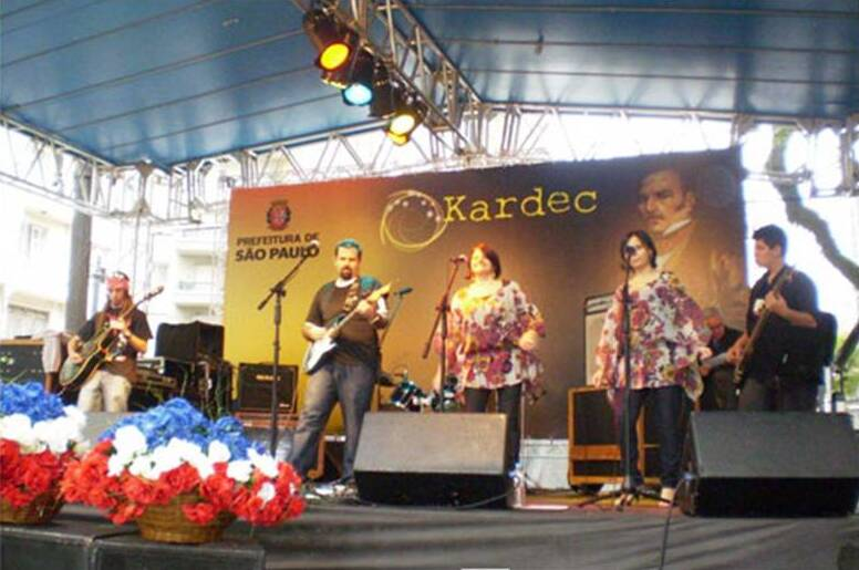 Festival "Allan Kardec", avec fête "typiquement française", Sao Paulo, Brésil, avril 2010.